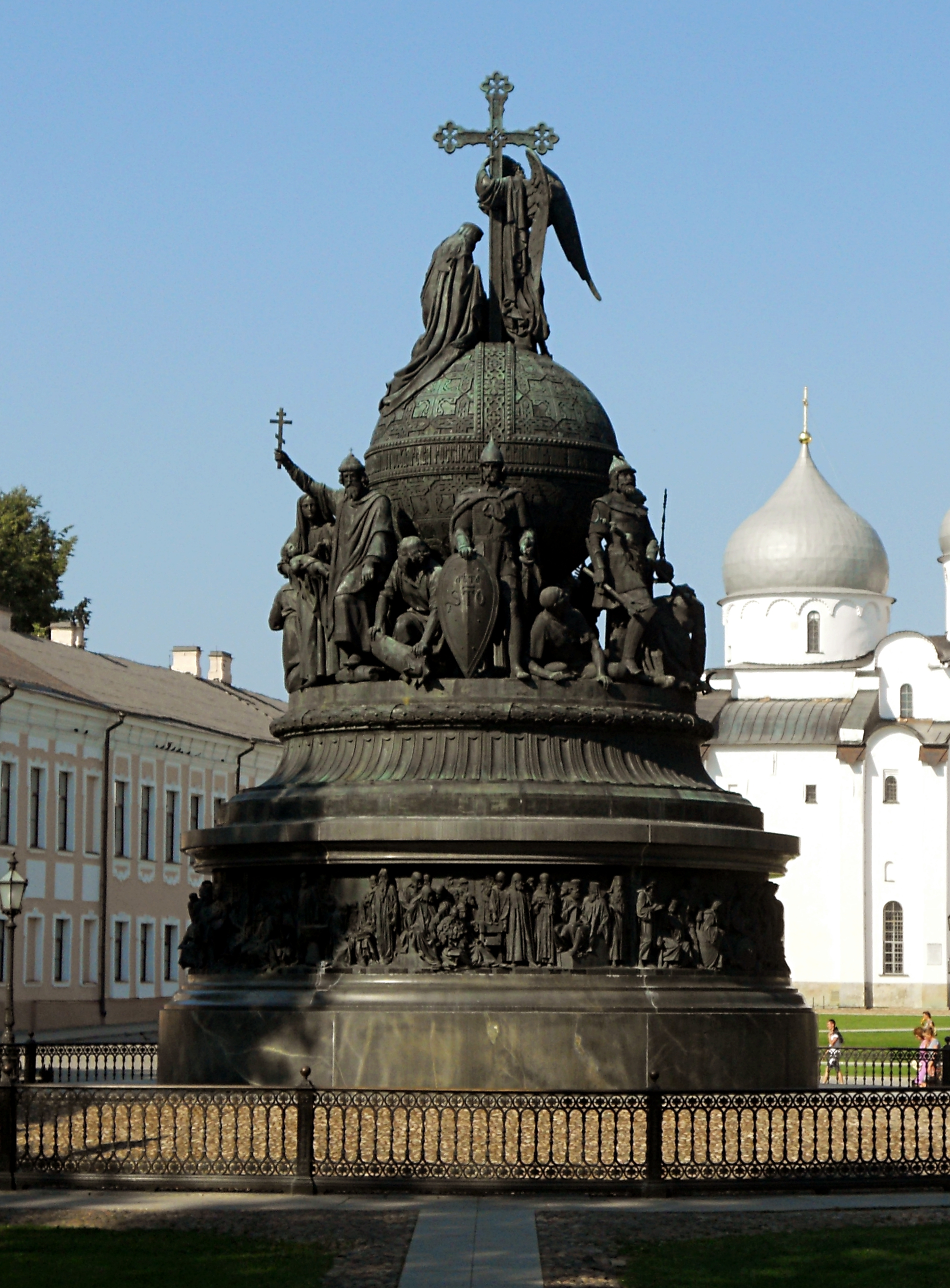 Памятник Тысячелетию России: Кремль, Великий Новгород, Новгородская область